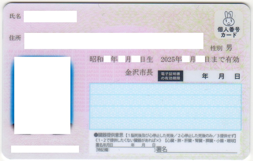 投稿者のものをスキャンし個人情報を抹消。